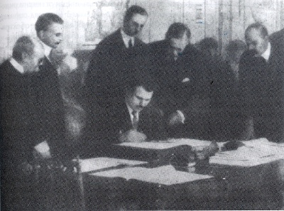 Българският министър-председател Александър Стамболийски подписва Ньойския договор